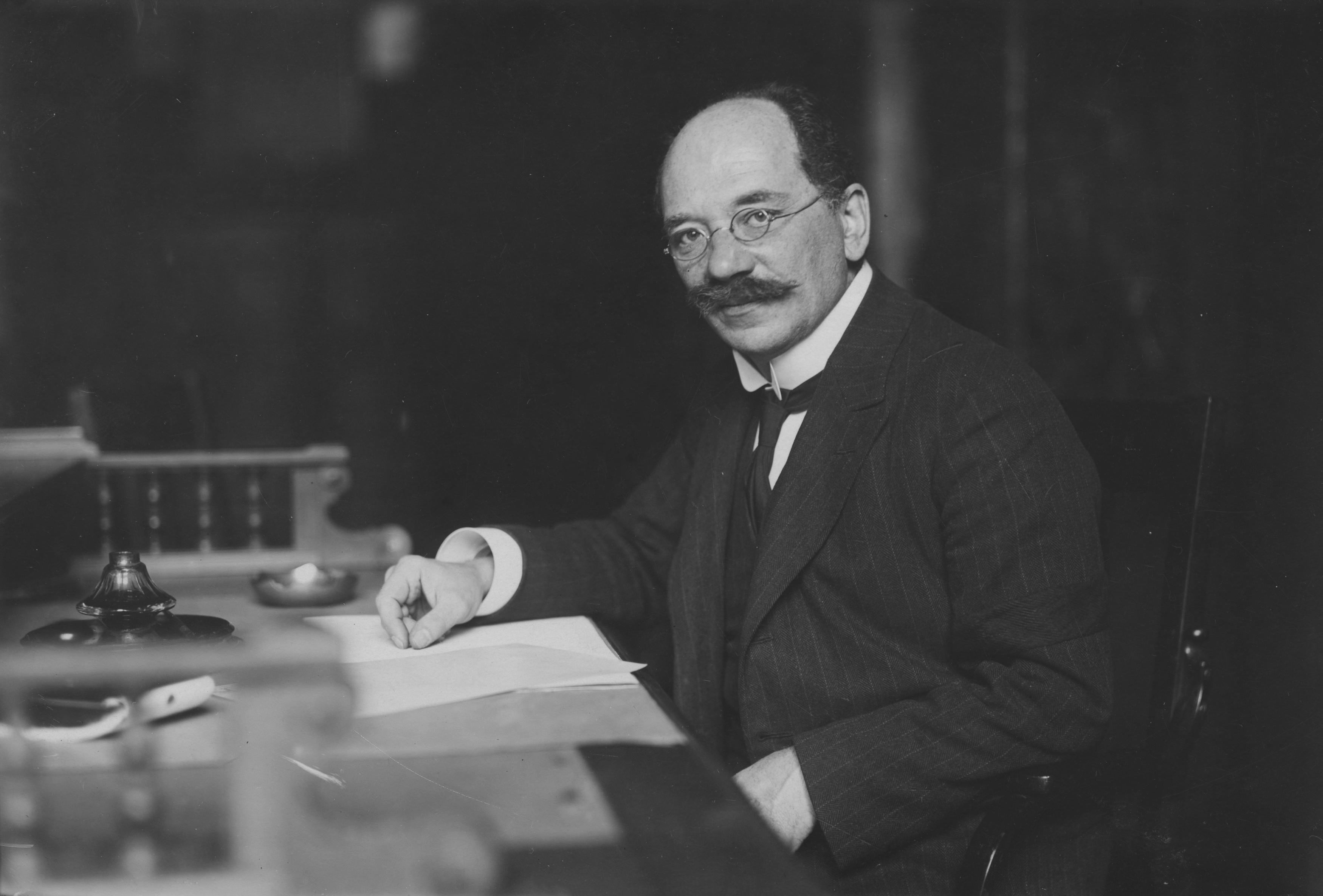 Станислав Кутшеба, полски историк на правото.